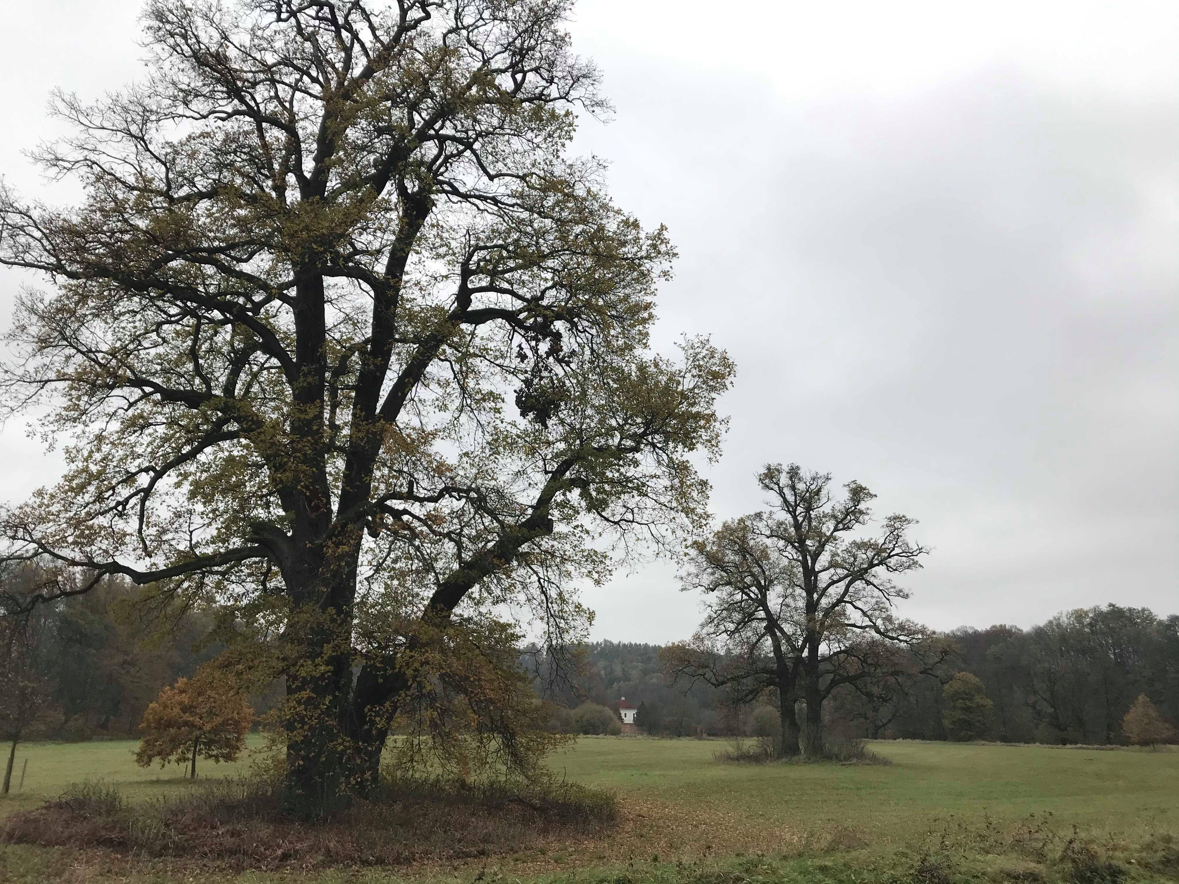 NPP Babiččino údolí, louka